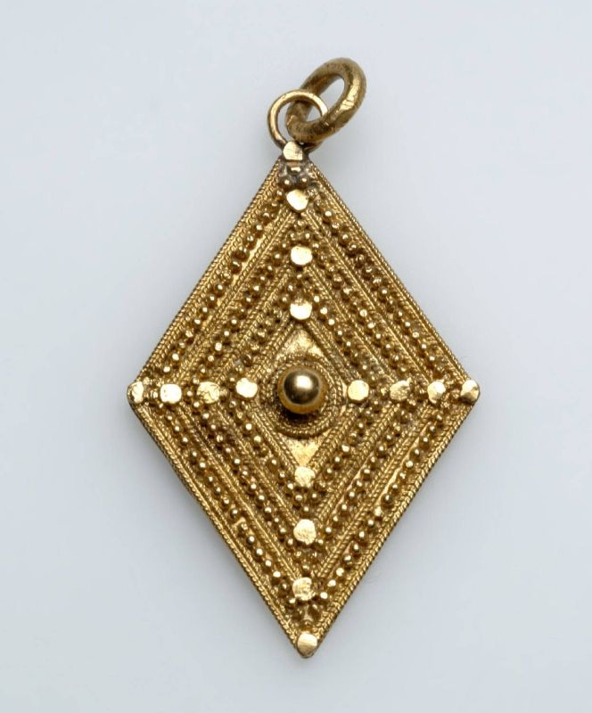 Halssieraad. Dit sieraad is vervaardigd door een zilversmid te Kabanjahé. De motieven zijn Karo, maar de uitvoering is mogelijk aangepast aan het gebruik door Europeanen.. Hanger van een halsketting